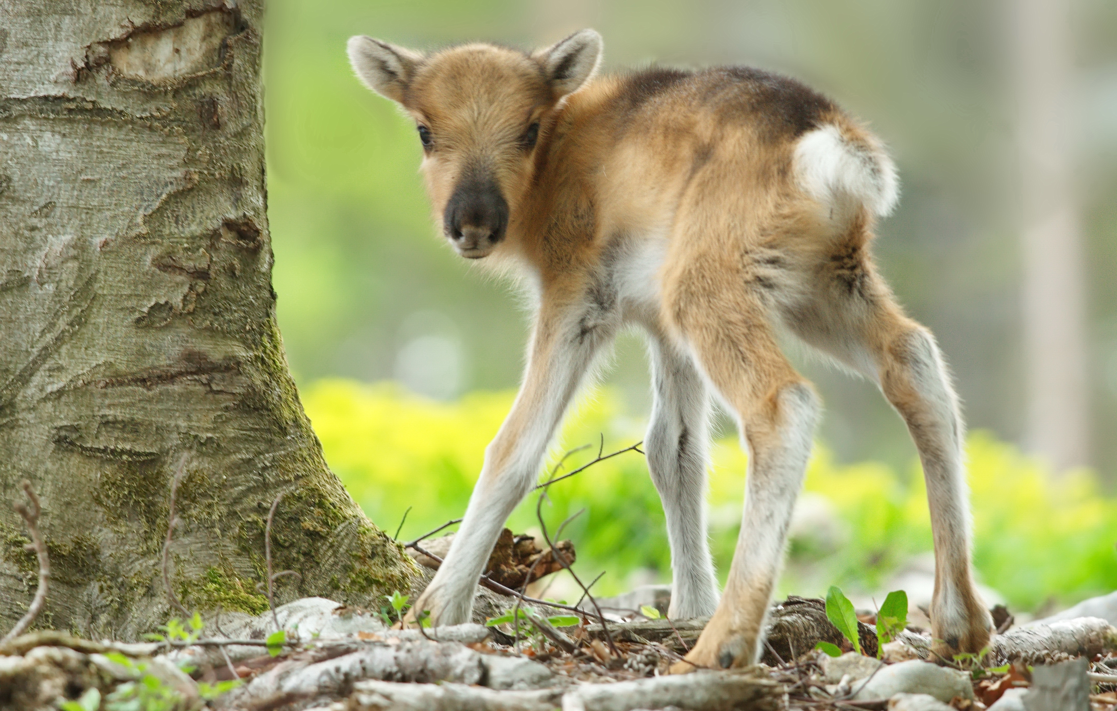 Un faon né au mois de juin 2013 (contradiction avec données EXIF ?) au Domaine des grottes de Han en Belgique.